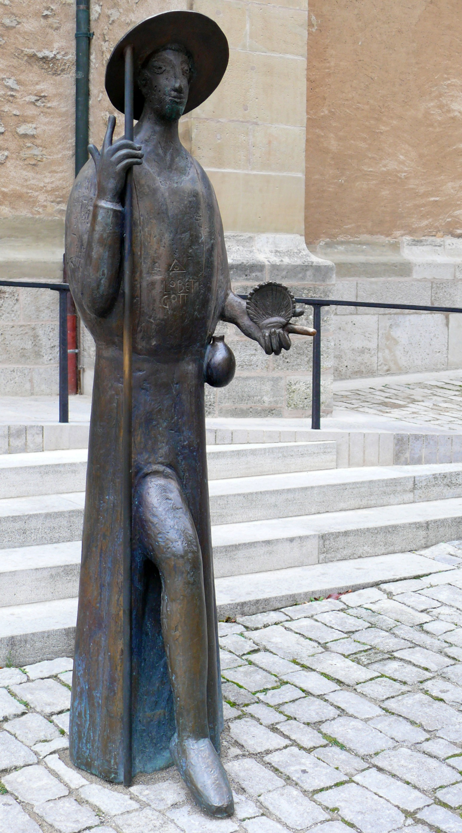 Pilgerdenkmal vor der St. Jakobkirche in Rothenburg ob der Tauber